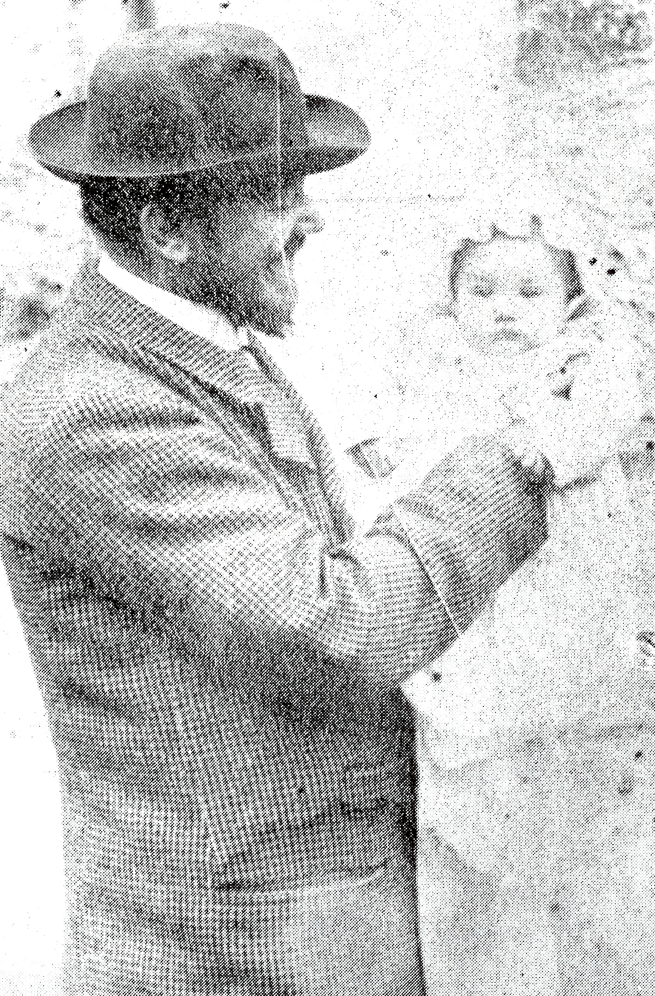 Le peintre luxembourgeois Ferdinand d'Huart (1858-1919)